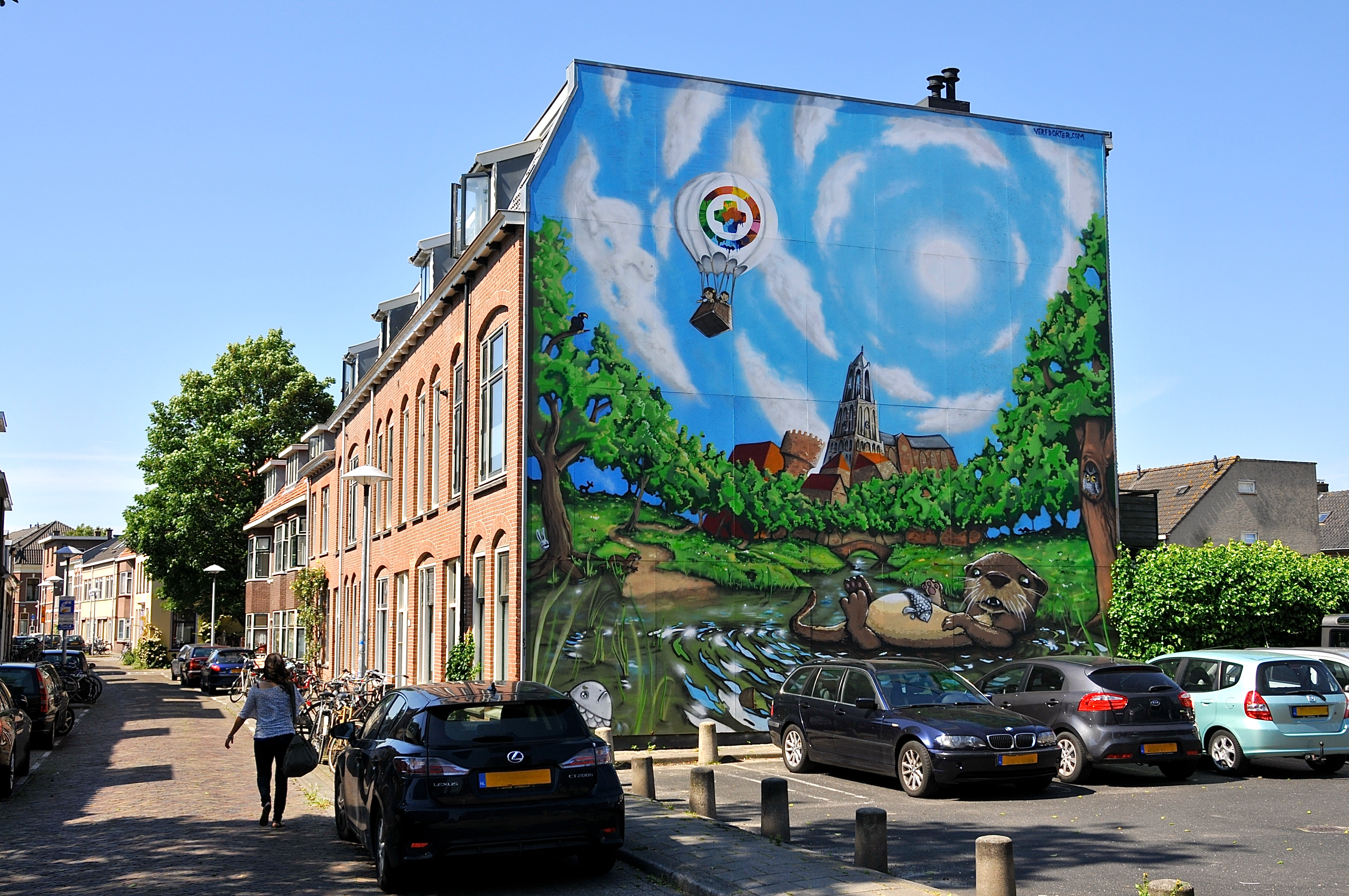 Otter Street